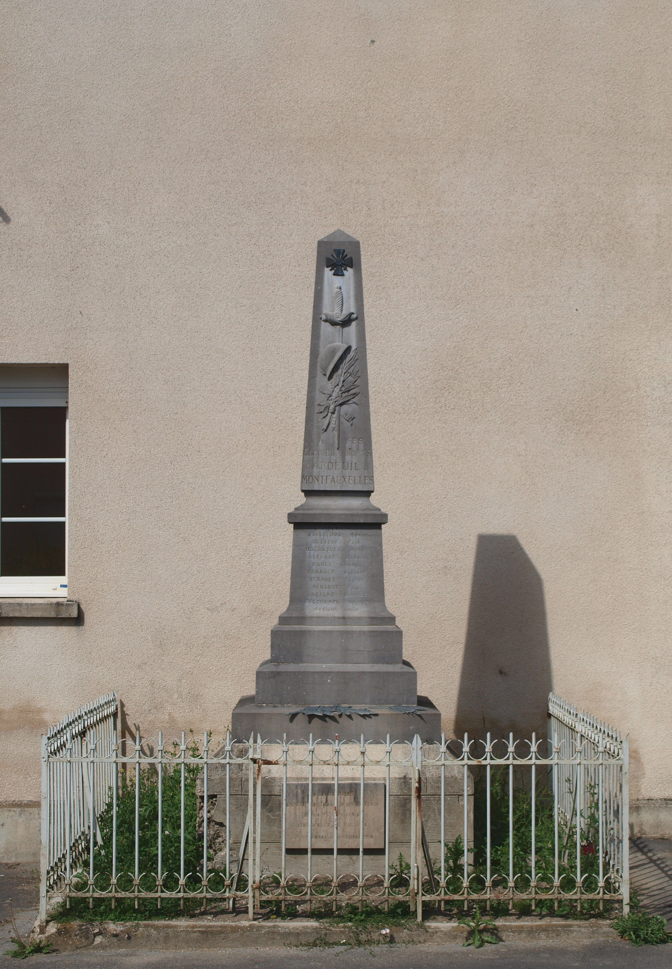 Ardeuil-et-Montfauxelles (Ardennes, France) ; monument aux morts